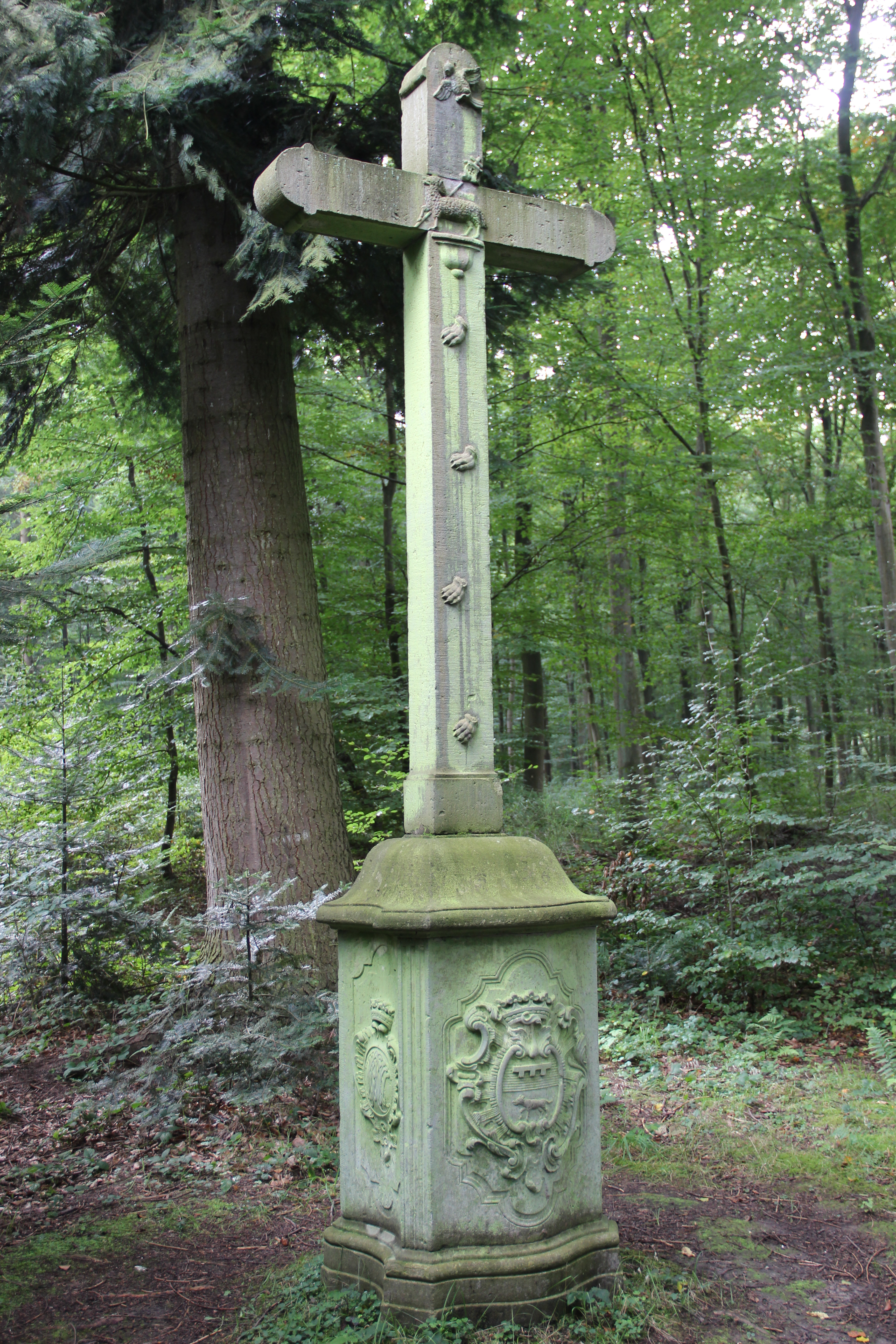 Das Wolfskreuz (auch: Jacobskreuz) im Kottenforst, Röttgen, Villiper Allee